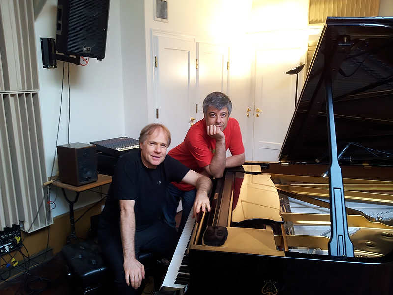 Marc Minier et Richard Clayderman au Studio de Meudon (Mai 2012) pour une Séance Piano. Un Steinway de Concert accordé par Bastien Herbin (tout simplement magistral), Julien Bassères à la prise de son (rien que ça), et assisté par Xavier Franc (très prometteur).